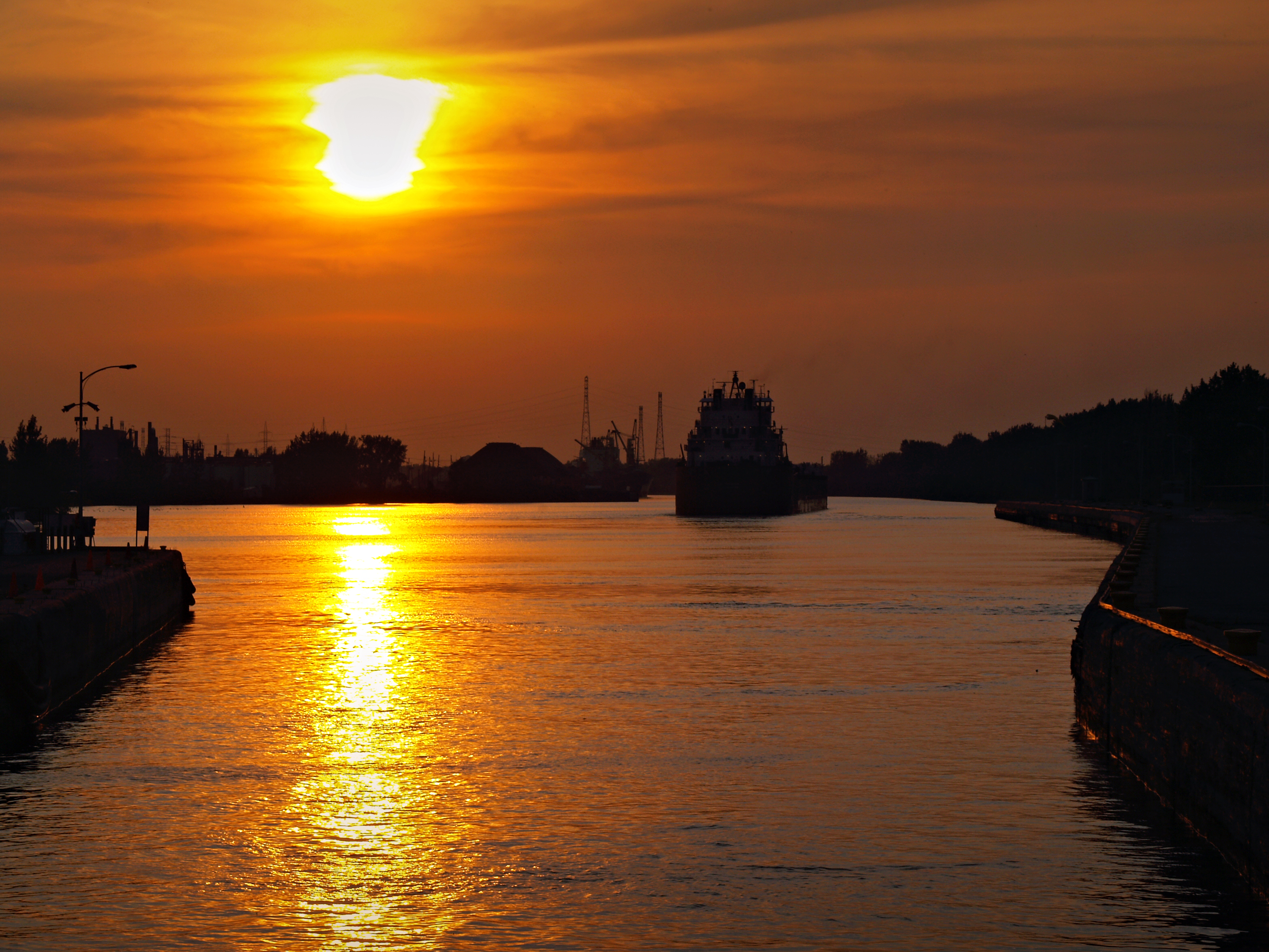 Sainte-Catherine (Québec - Voie maritime du Saint-Laurent